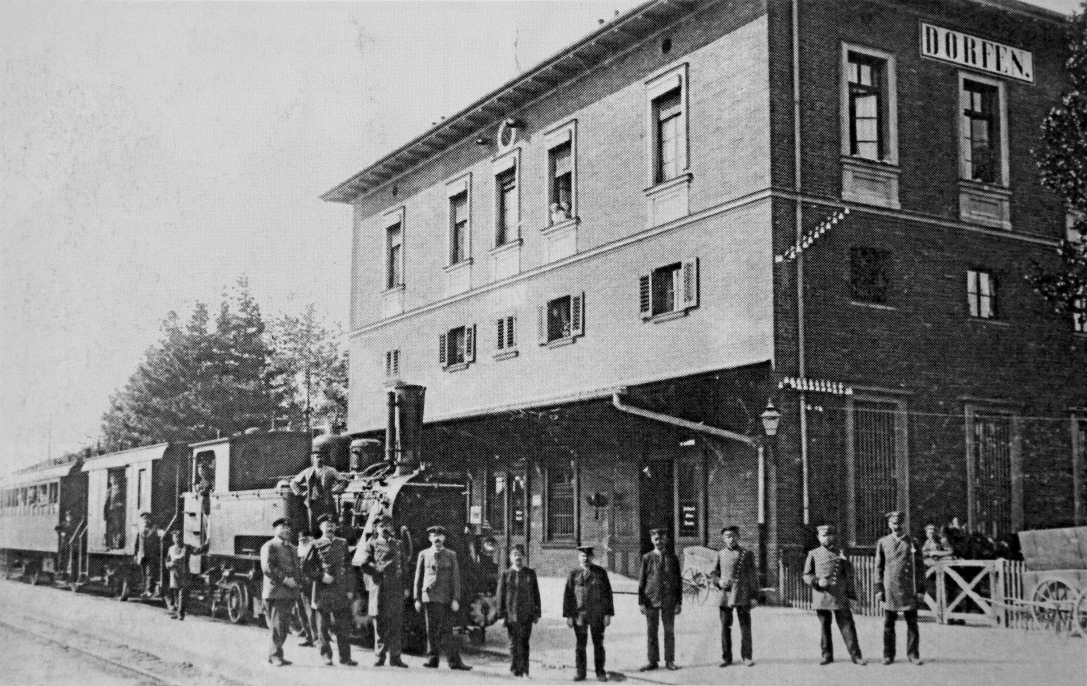 Tenderlokomotive D XI Nr. 2009 mit einem Personenzug nach Velden auf dem neuen Gleis 1 des Bahnhofs Dorfen vor dem Empfangsgebäude, davor das versammelte Stationspersonal.